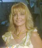 Julia Moller, modelo, conductora y empresaria uruguaya., toma del 18 de febrero de 2014.